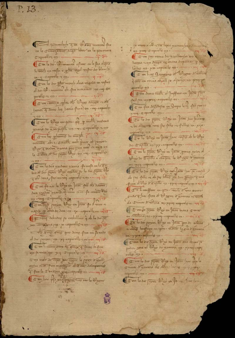 Folio 13 recto del manuscrito de la Crònica de Ramon Muntaner. Biblioteca Nacional (España), signatura Ms. 1803.